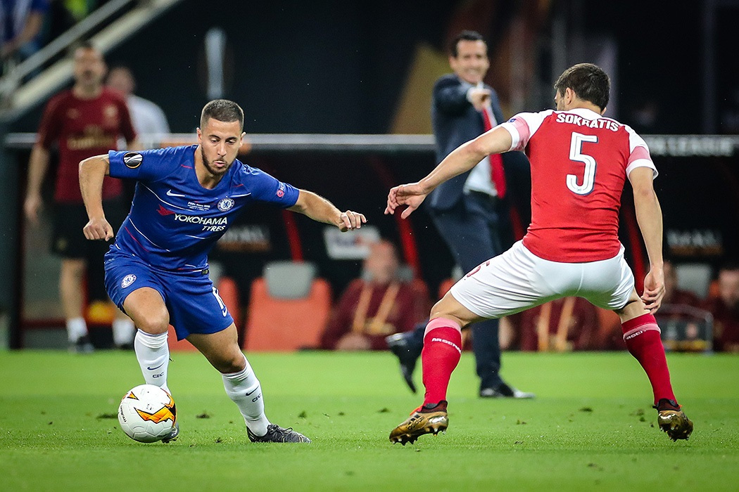 مسابقه چلسی و آرسنال، فینال لیگ اروپا ۲۰۱۹